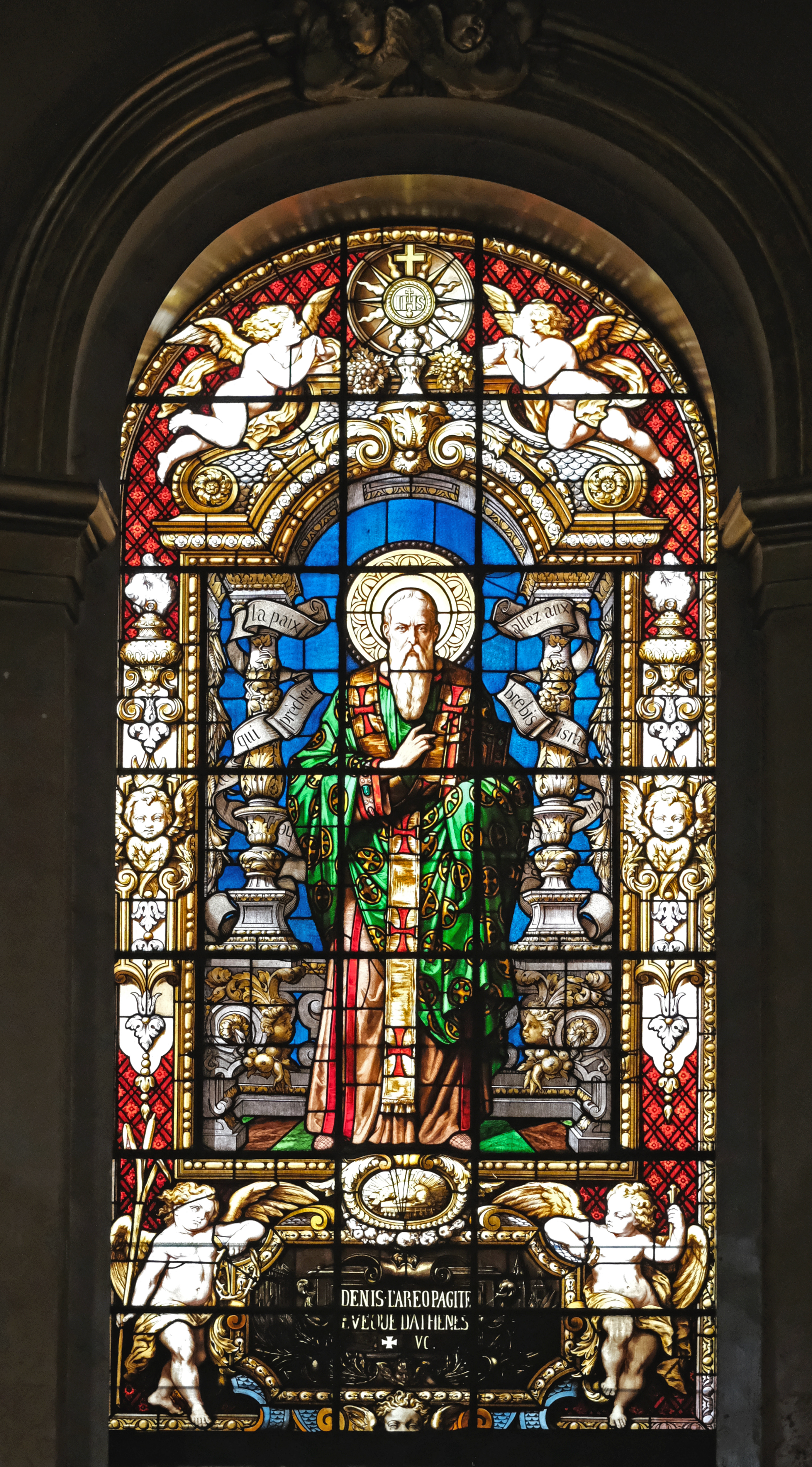 Église Saint-Roch (vitrail "Saint Denis l'aeropagite") - Paris Ier